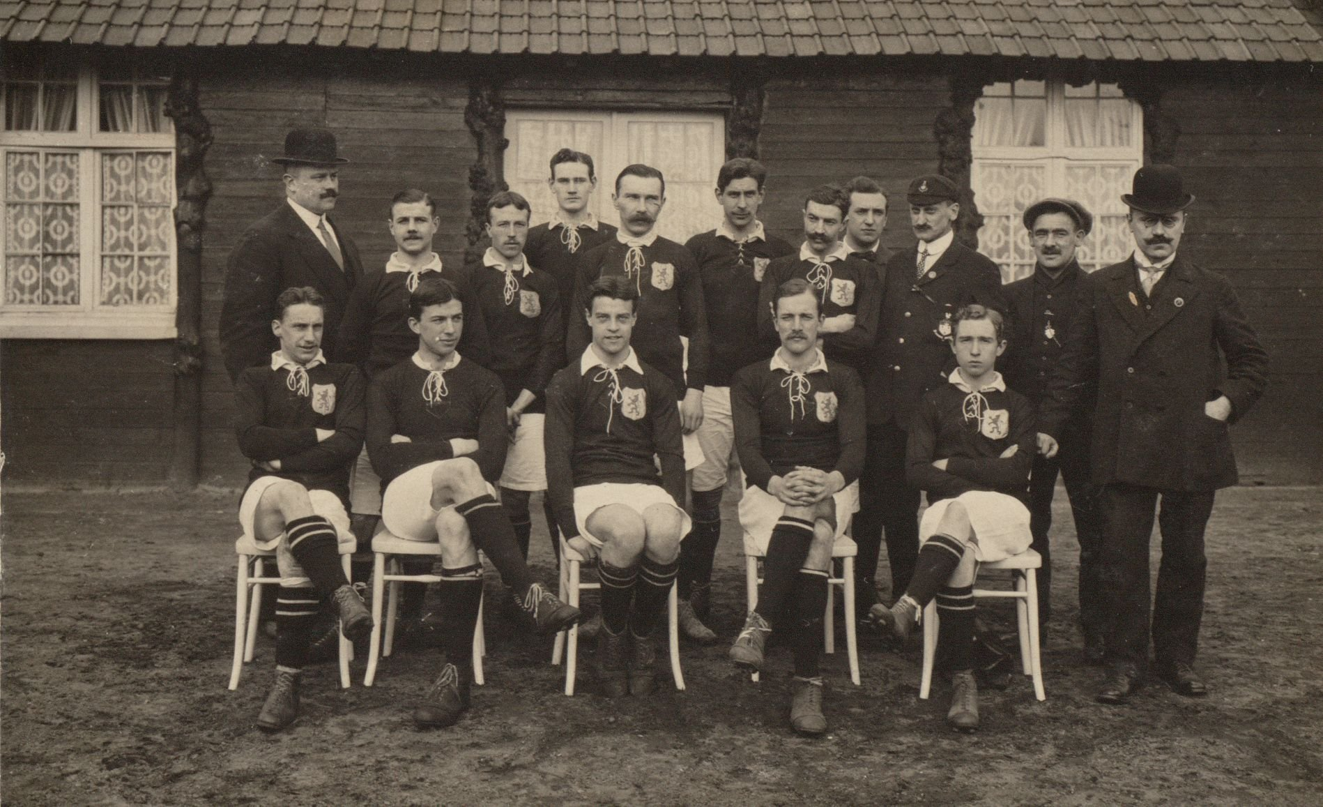 Nederlands elftal voor de interland tegen België. Staand, van links naar rechts: Blöte (NVB), Gé Fortgens, Nico de Wolf, Just Göbel, Bok de Korver, Louis Otten, Arnold Hörburger, grensrechter Meerum Terwogt, scheidsrechter Campbell, oefenmeester Edgar Chadwick en Hirschmann (NVB). Zittend: Caius Welcker, Guus Lutjens, Mannes Francken, Jan Thomée en Nol van Berckel. België - Nederland (1-5), gespeeld op 19 maart 1911 op het Beerschot-terrein te Antwerpen. Opstelling: Just Göbel (Vitesse), Nico de Wolf (Haarlem), Louis Otten (Quick den Haag), Gé Fortgens (Ajax), Bok de Korver (Sparta, aanvoerder), Arnold Hörburger (VOC), Caius Welcker (Quick den Haag), Guus Lutjens (HVV), Mannes Francken (HFC), Jan Thomée (Concordia) en Nol van Berckel (Quick Nijmegen)